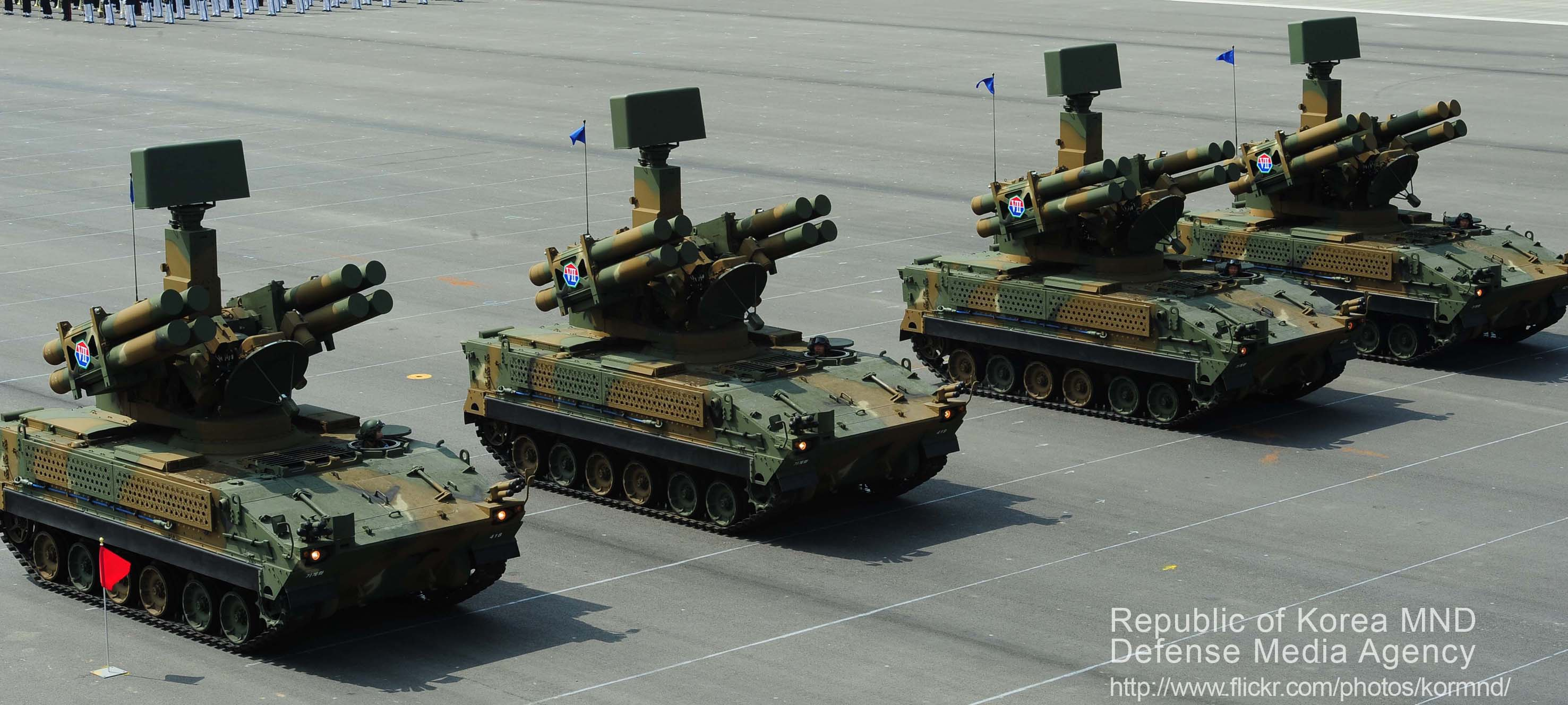 촬영 - 이헌구 기자